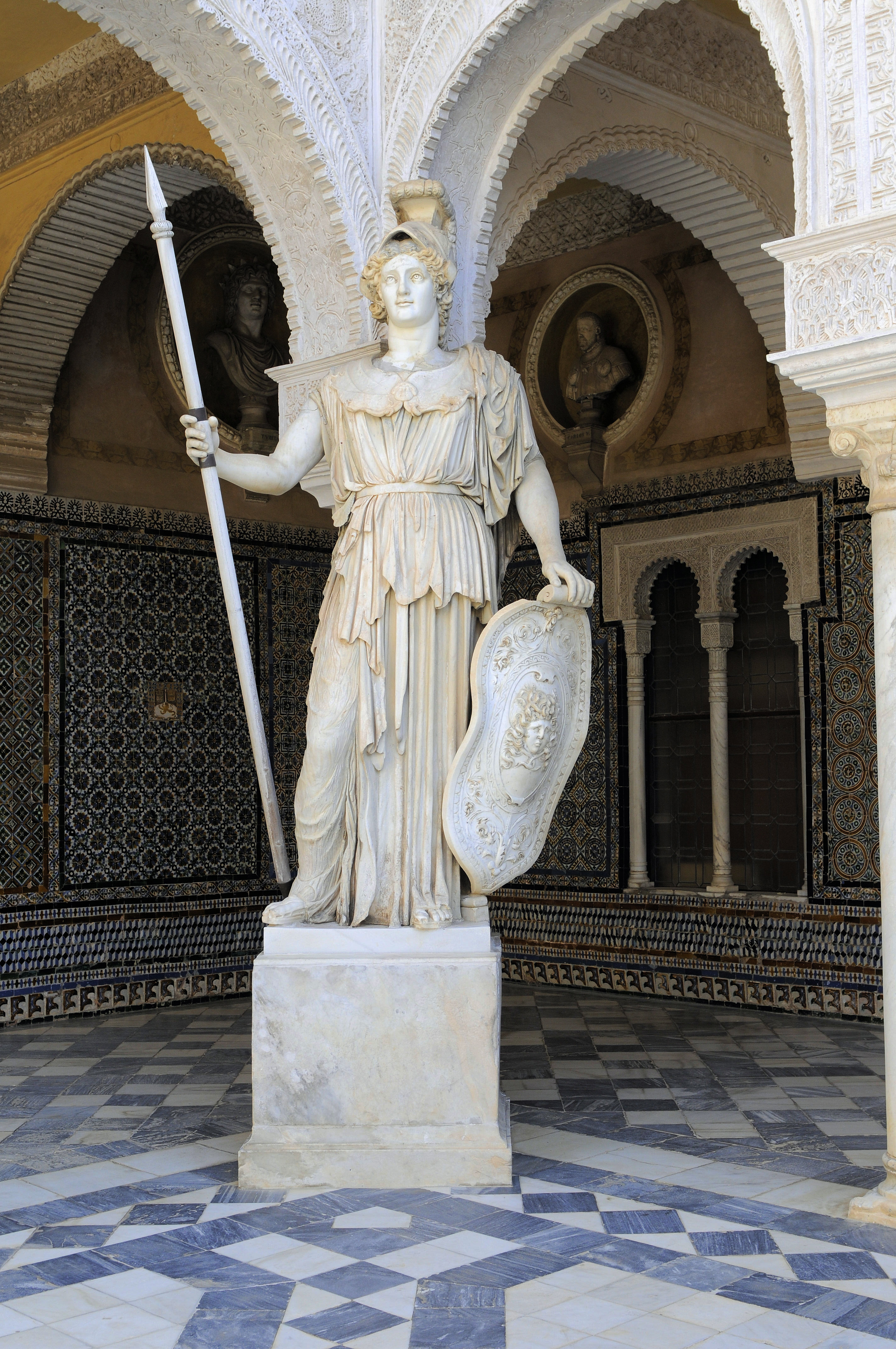 Estatua romana de la diosa Atenea en la Casa de Pilatos.